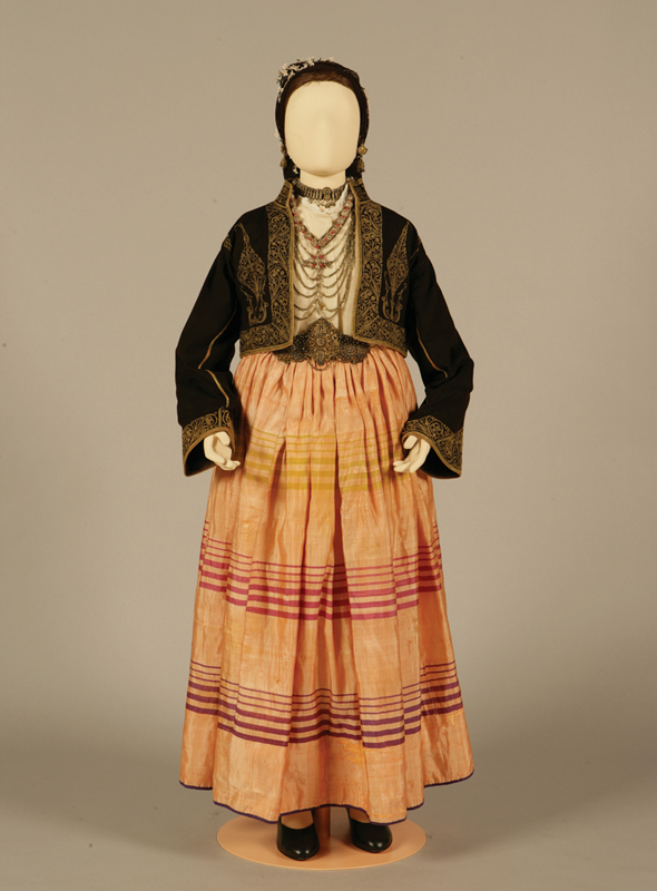 Φορεσιά «Αμαλία» με φούστα «σατακρούτα» Κύπρος. Αρχές 20ού αιώνα Συλλογή Πελοποννησιακού Λαογραφικού Ιδρύματος, Ναύπλιο